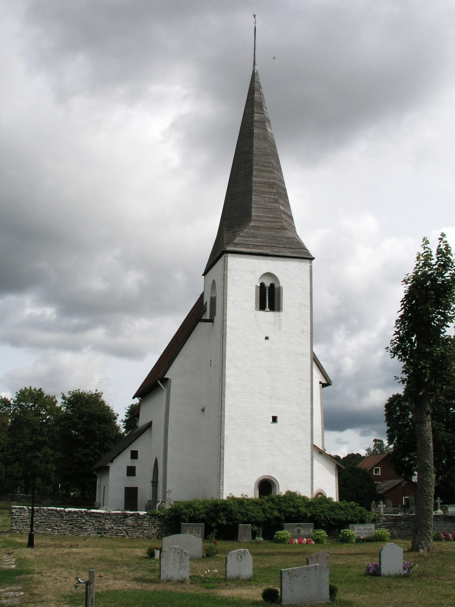 Martebo kyrka, Diocese of Visby, Gotland, Sweden.